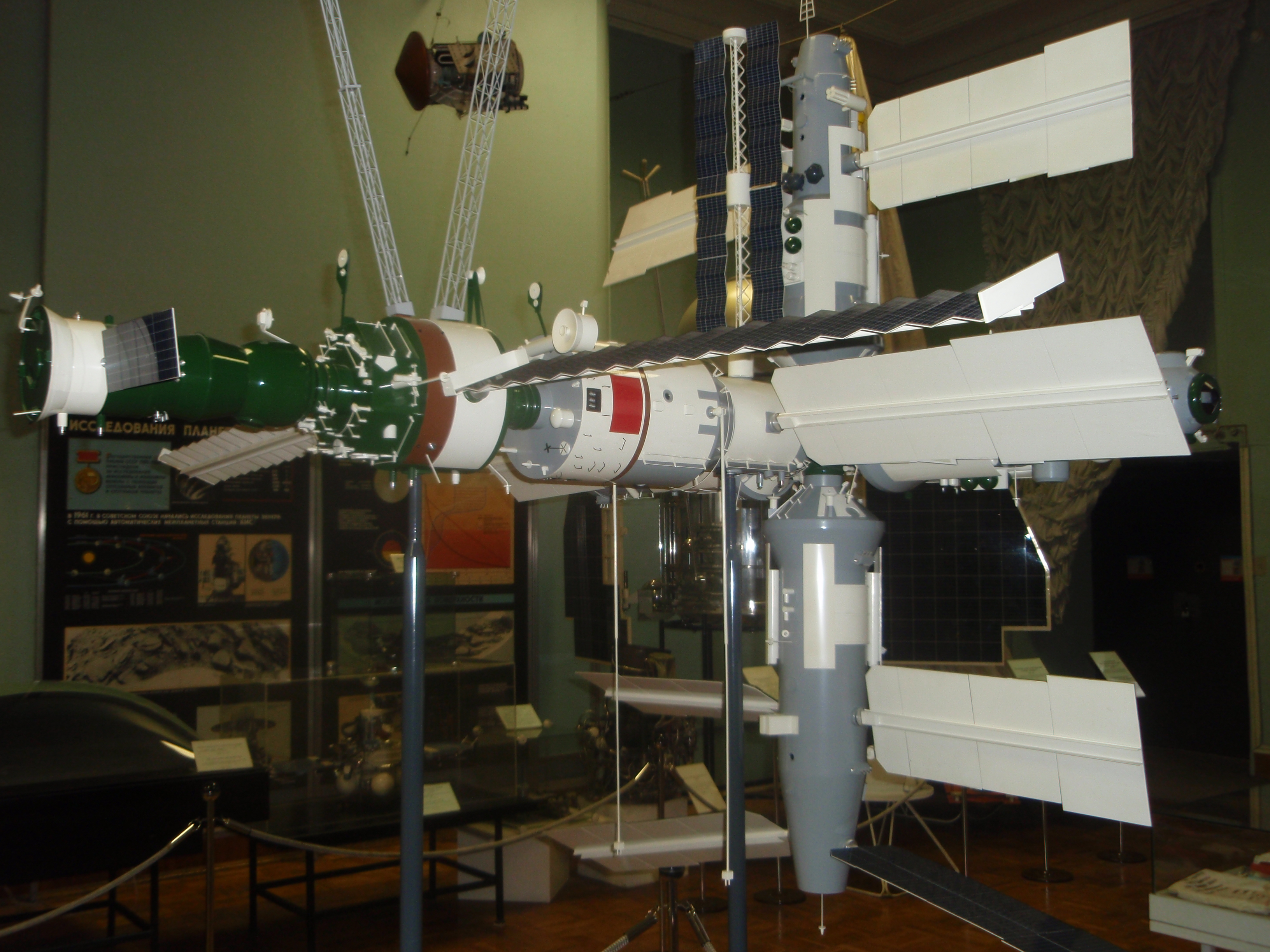 Модель орбитальной станции «Мир», Государственный Политехнический музей (г.Москва)